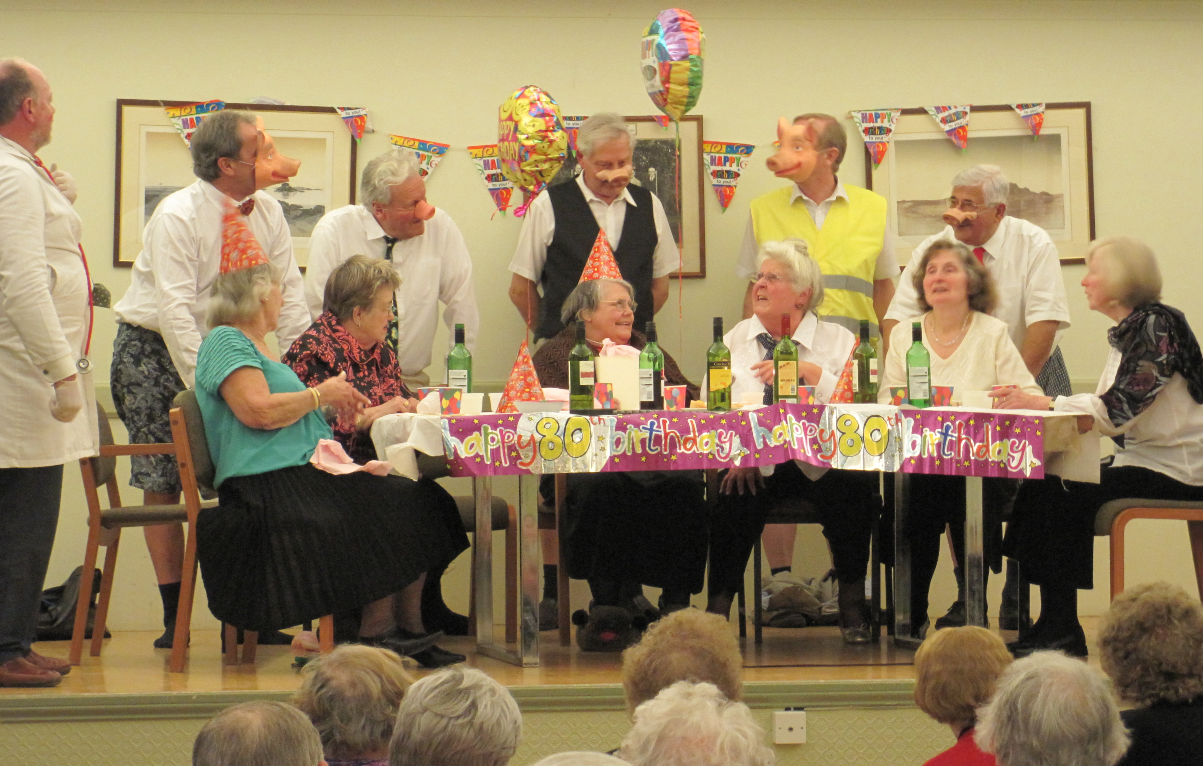 Nrf: Concèrt en Jèrriais à la Salle Publyique dé Saint Martîn, Jèrri, lé 29 d'Janvyi 2010, présenté par L'Assembliée d'Jèrriais